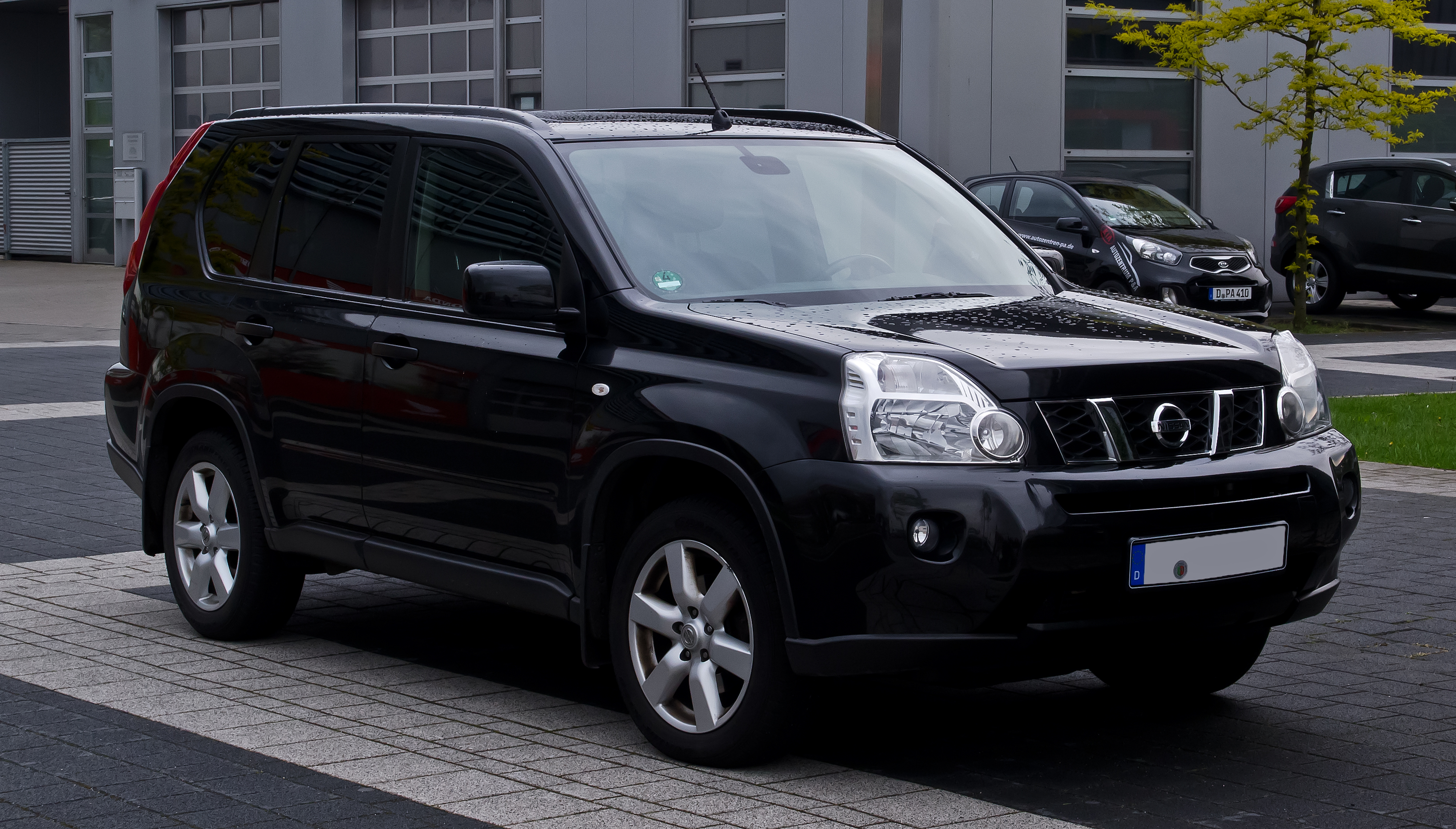 Nissan X-Trail 2.0 dCi 4x4 (T31)